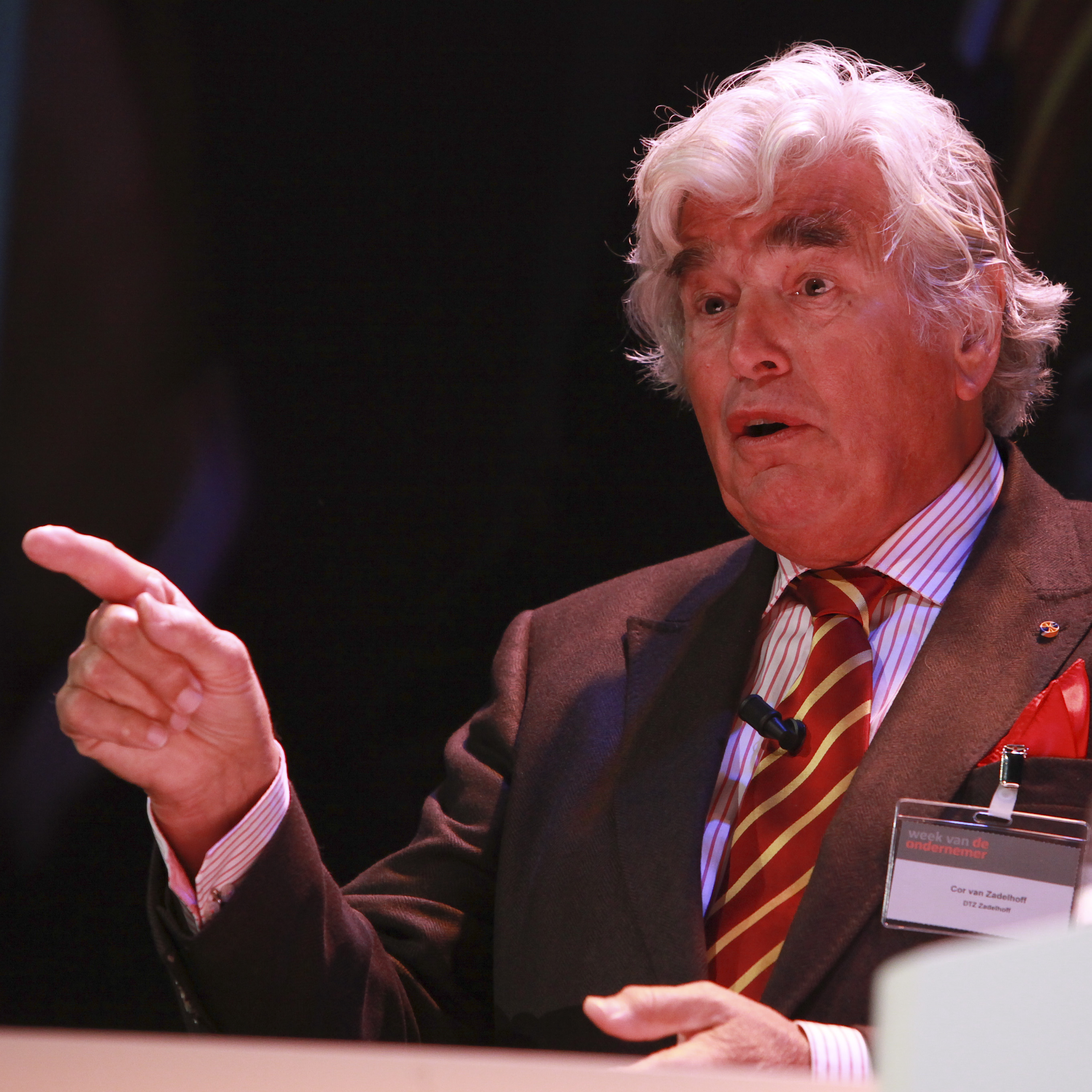 Cor van Zadelhoff tijdens de Week van de Ondernemer op 12 april 2011.